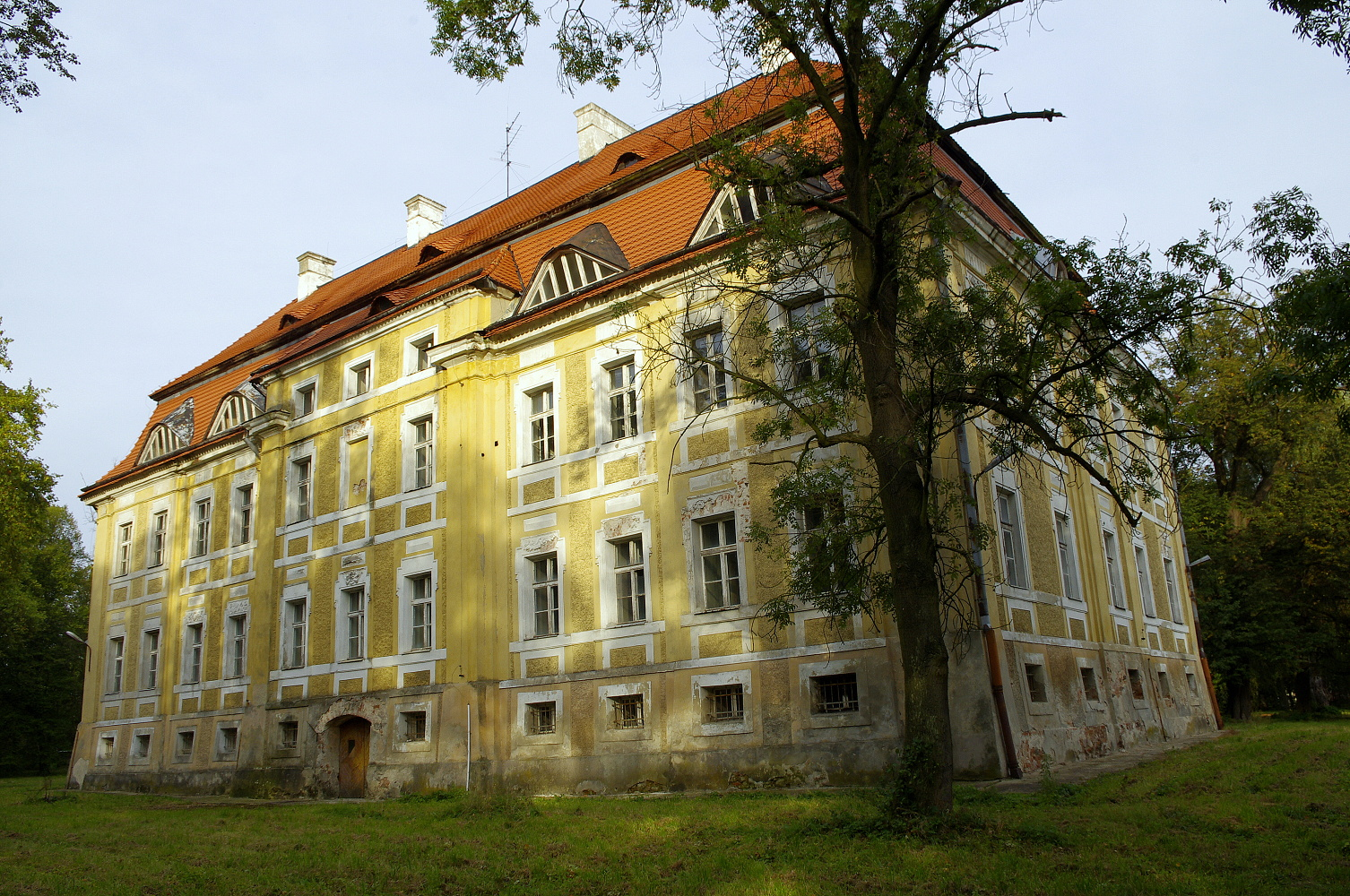 Sułów, ul. Zamkowa 5 - pałac, ok. 1680, pocz. XIX (widik z tyłu)